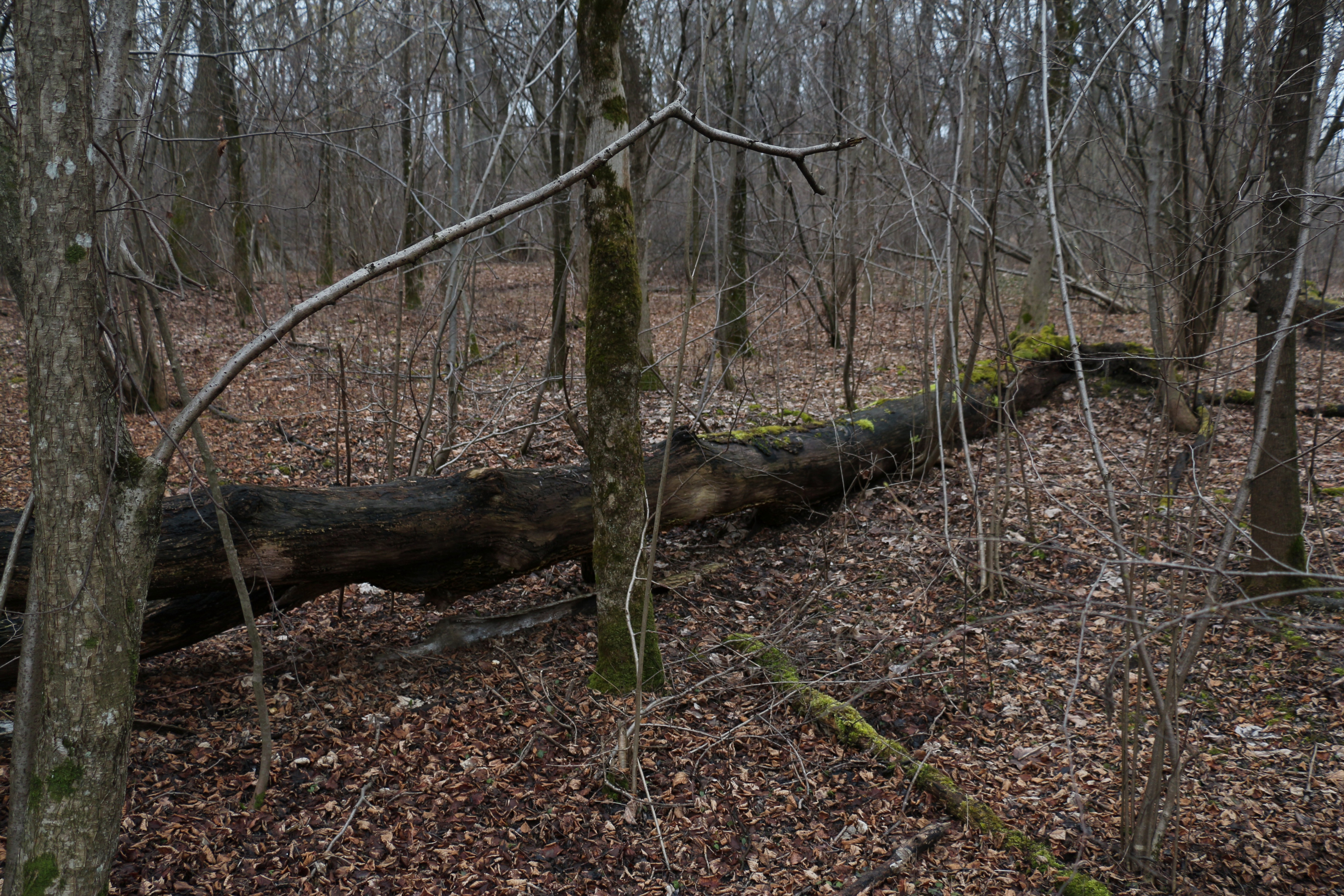 In der Itzlinger Au im Februar; Salzburg, Stadtteil Liefering. This media shows the Geschützter Landschaftsteil in Salzburg with the ID GLT00108.